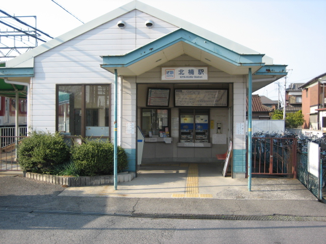 北楠駅